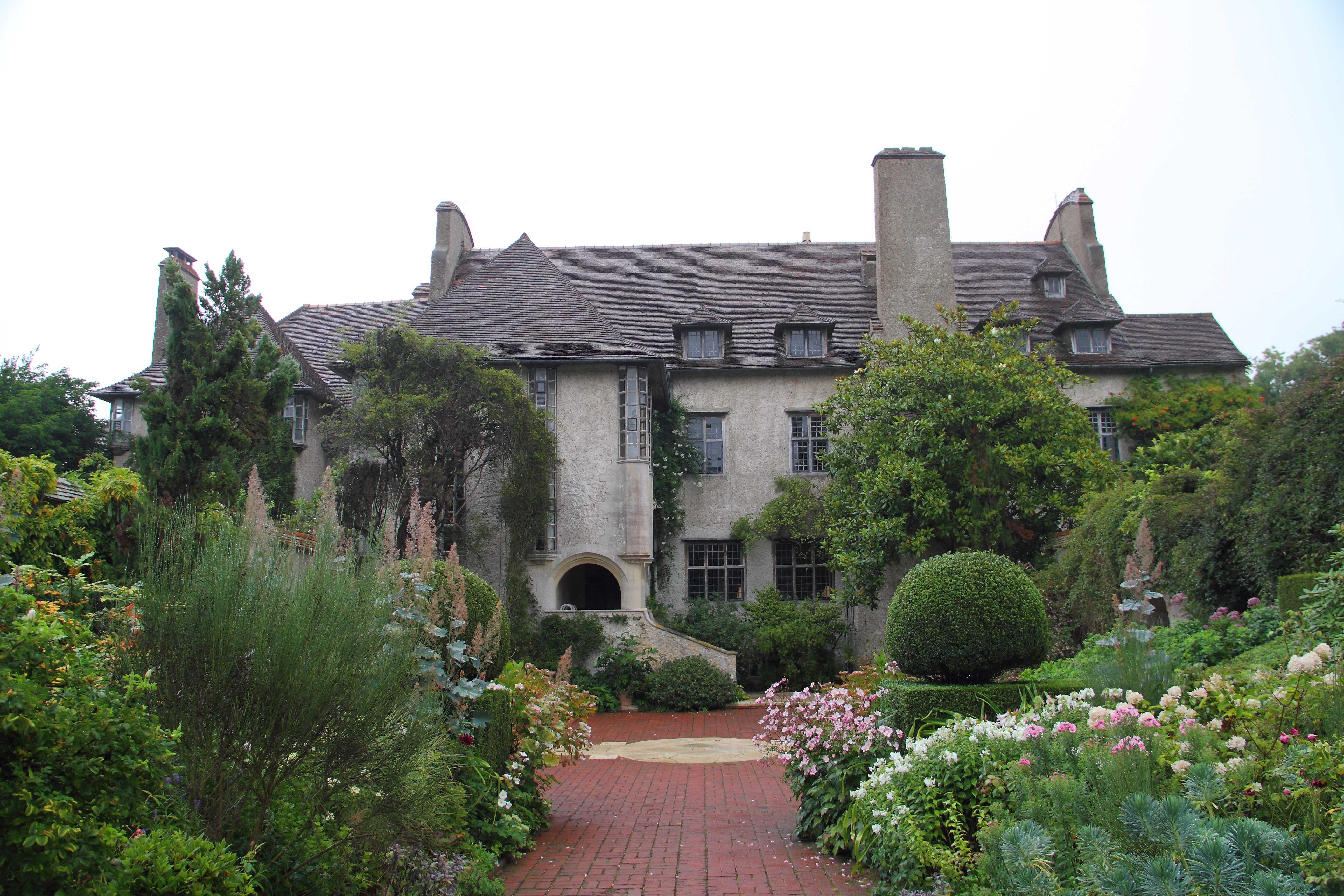 Im Park Bois des Moutiers in Varengeville-sur-Mer im Sommer 2017.